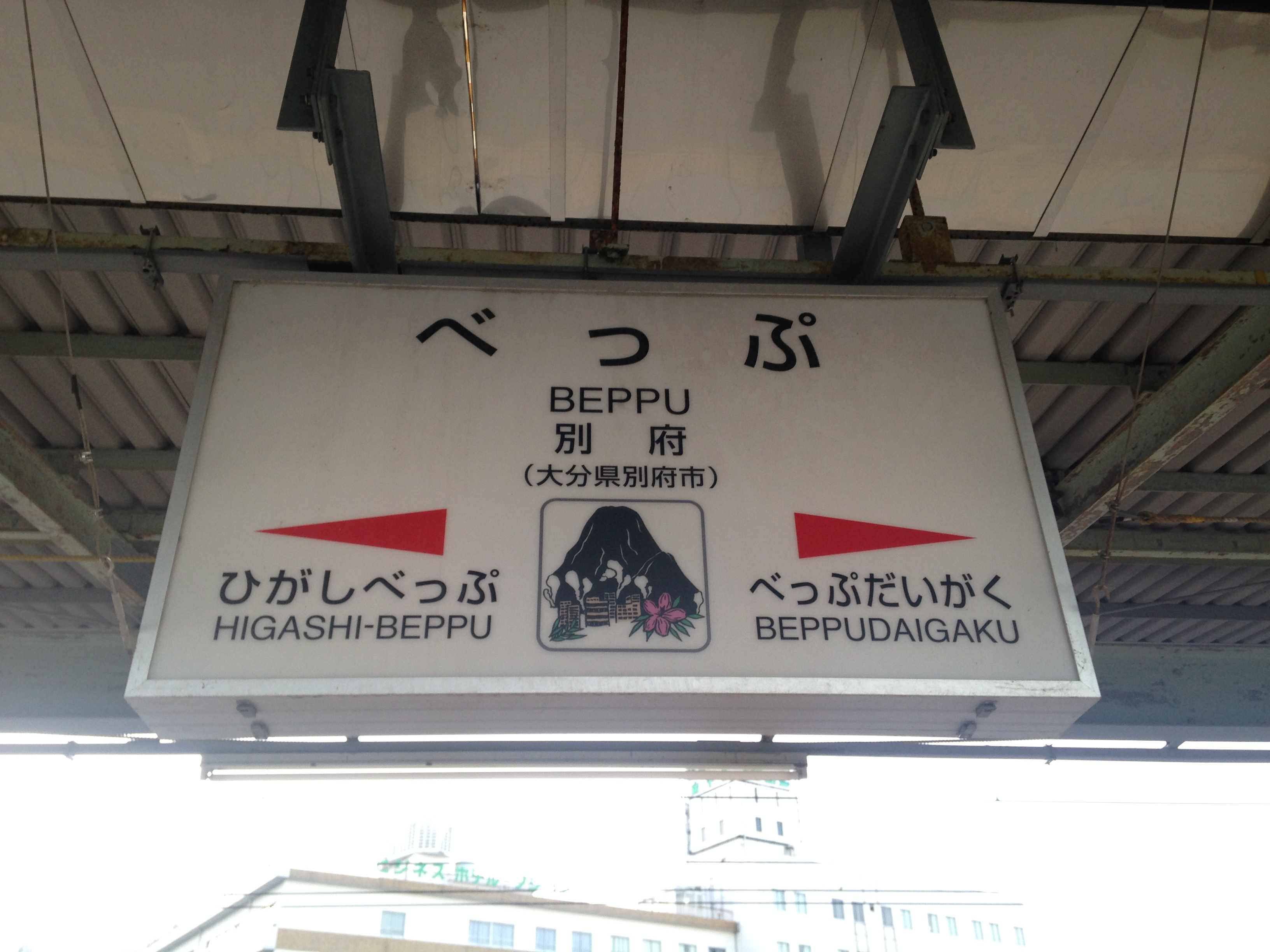 別府駅の駅名標。イラストは別府市のスカイラインと鶴見岳と市の花の「オオムラサキ」